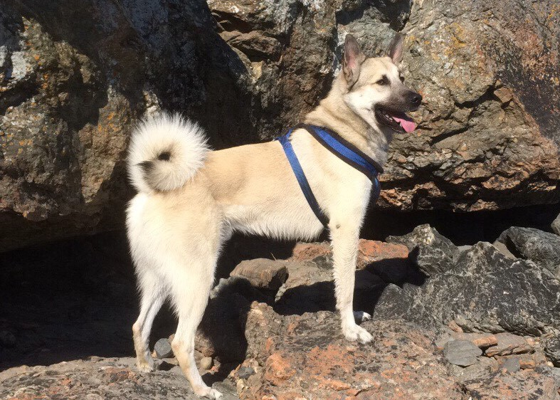 Hedehund